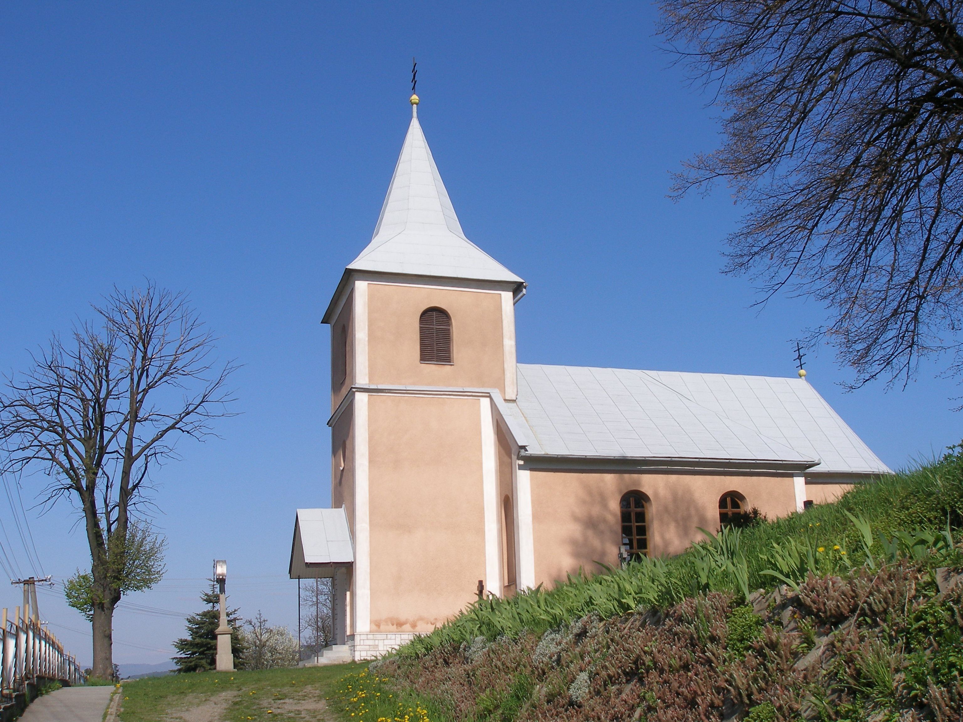 Obec Chmeľov okres Prešov región Šariš